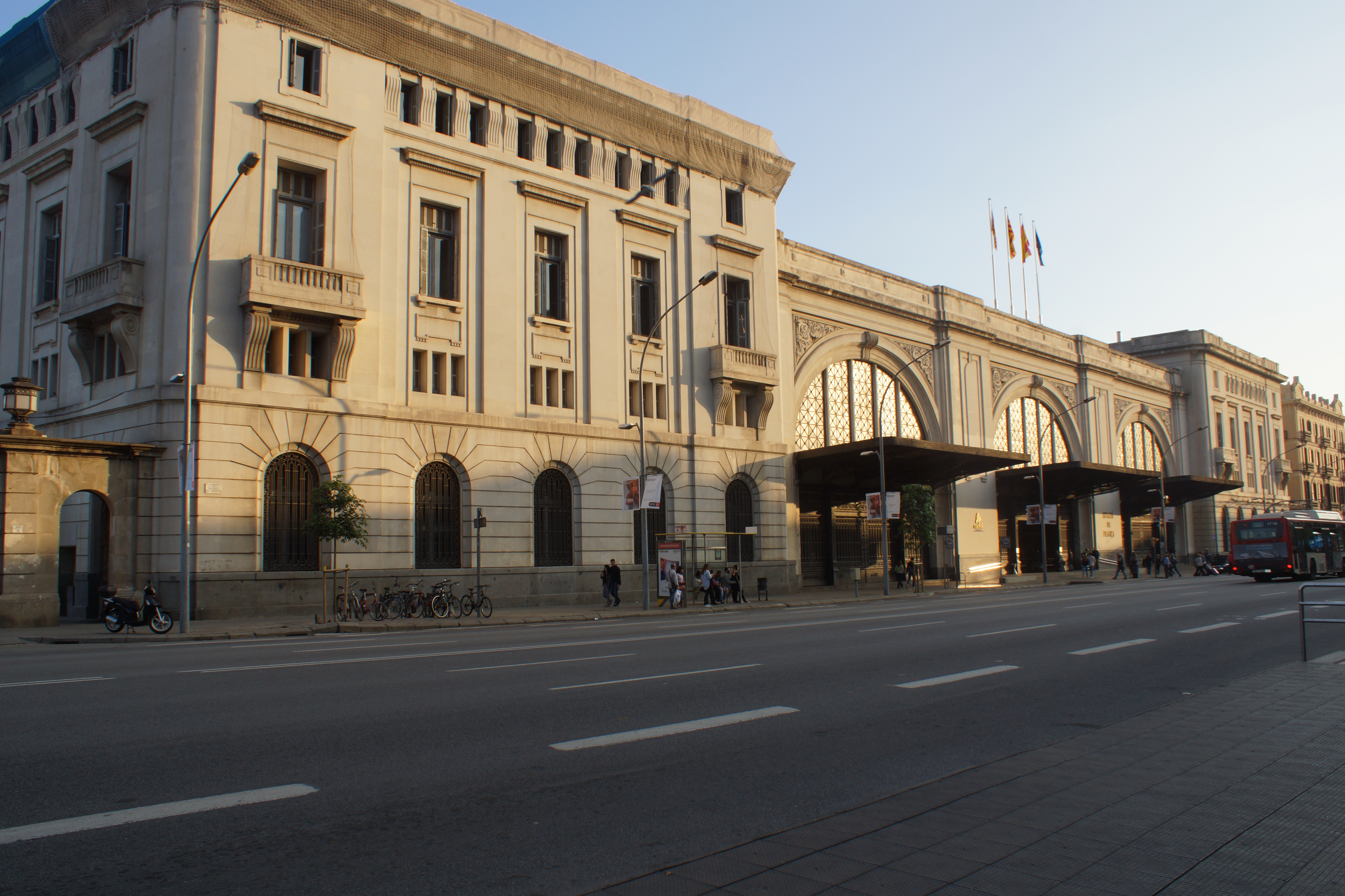 Façade sur la rue de la gare de Barcelone-França.